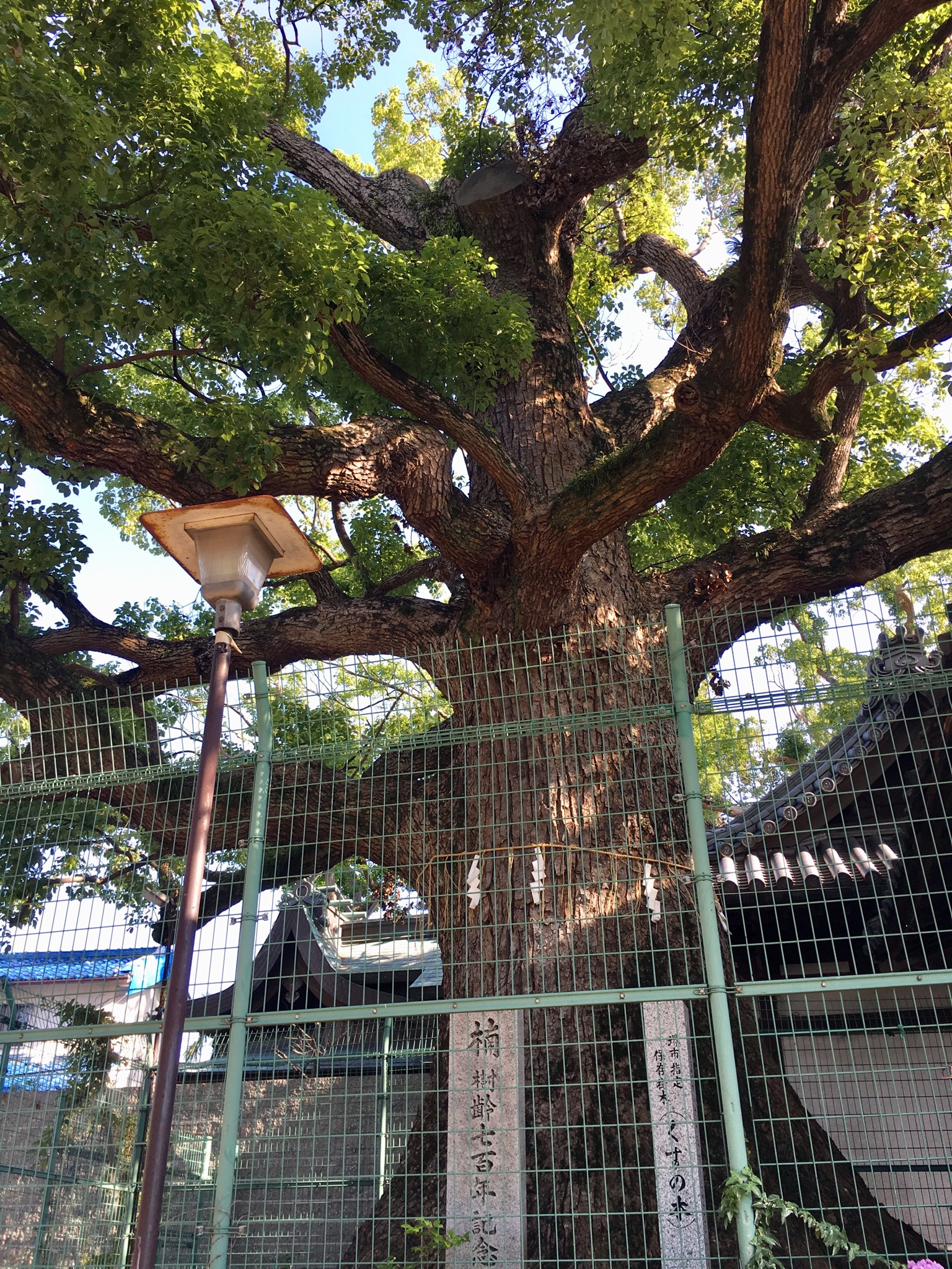 2019年7月、踞尾八幡神社で撮影。